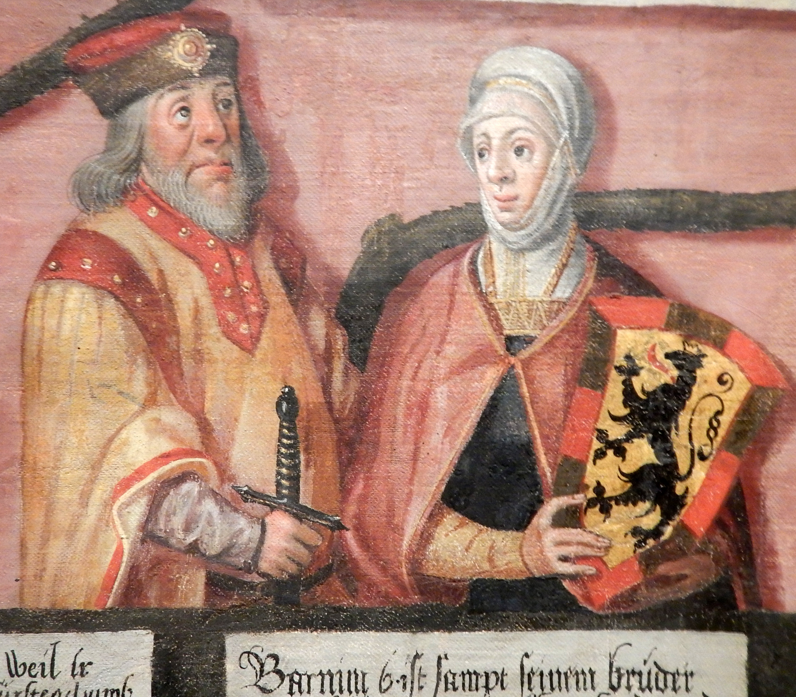 Barnim VI. von Pommern.